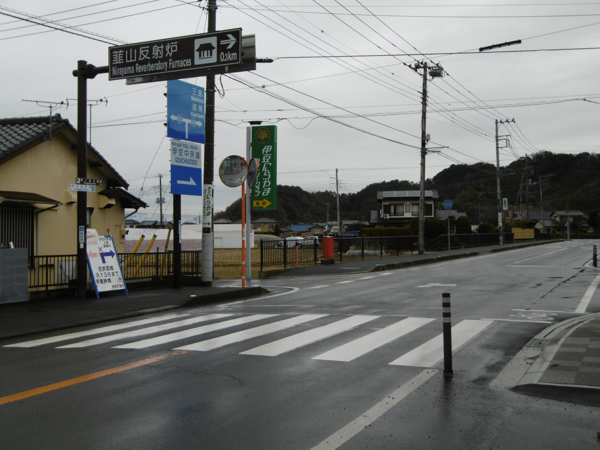 静岡県伊豆の国市中付近から、静岡県道132号韮山反射炉線(左手前方)と静岡県道136号函南停車場反射炉線(右奥方)が別れる。画像の右に曲がり、韮山反射炉前までその2つの県道が重複する。